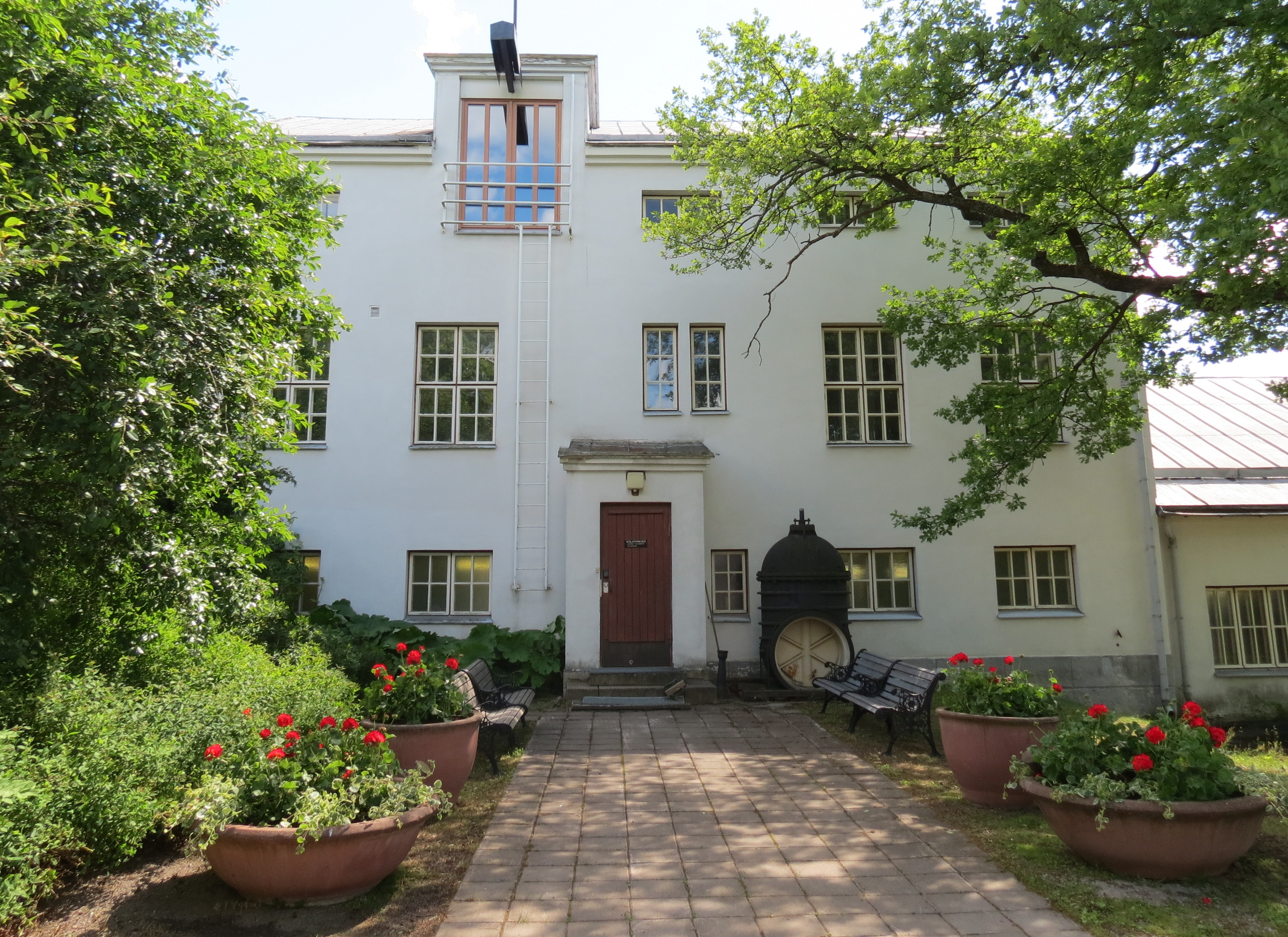 Turun vesilaitosmuseo Halistenkoskella Turussa.